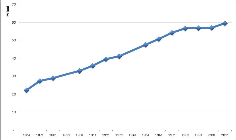 Evoluzione demografica italiana dall'Unità a oggi